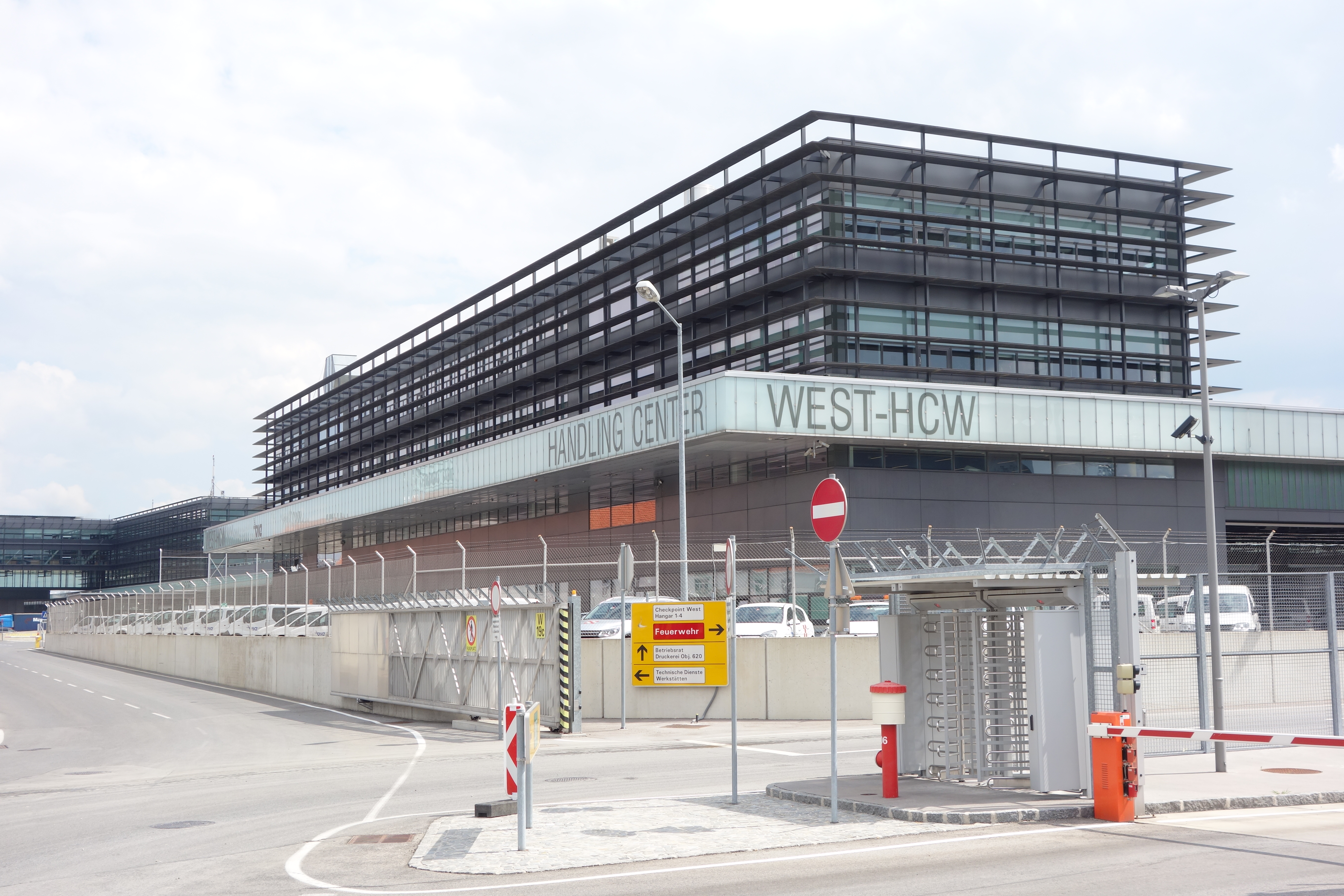 Das Handling Center West am Flughafen Wien im Juli 2014. Links hinten ist auch ein Teil des Air Cargo Centers zu erkennen.